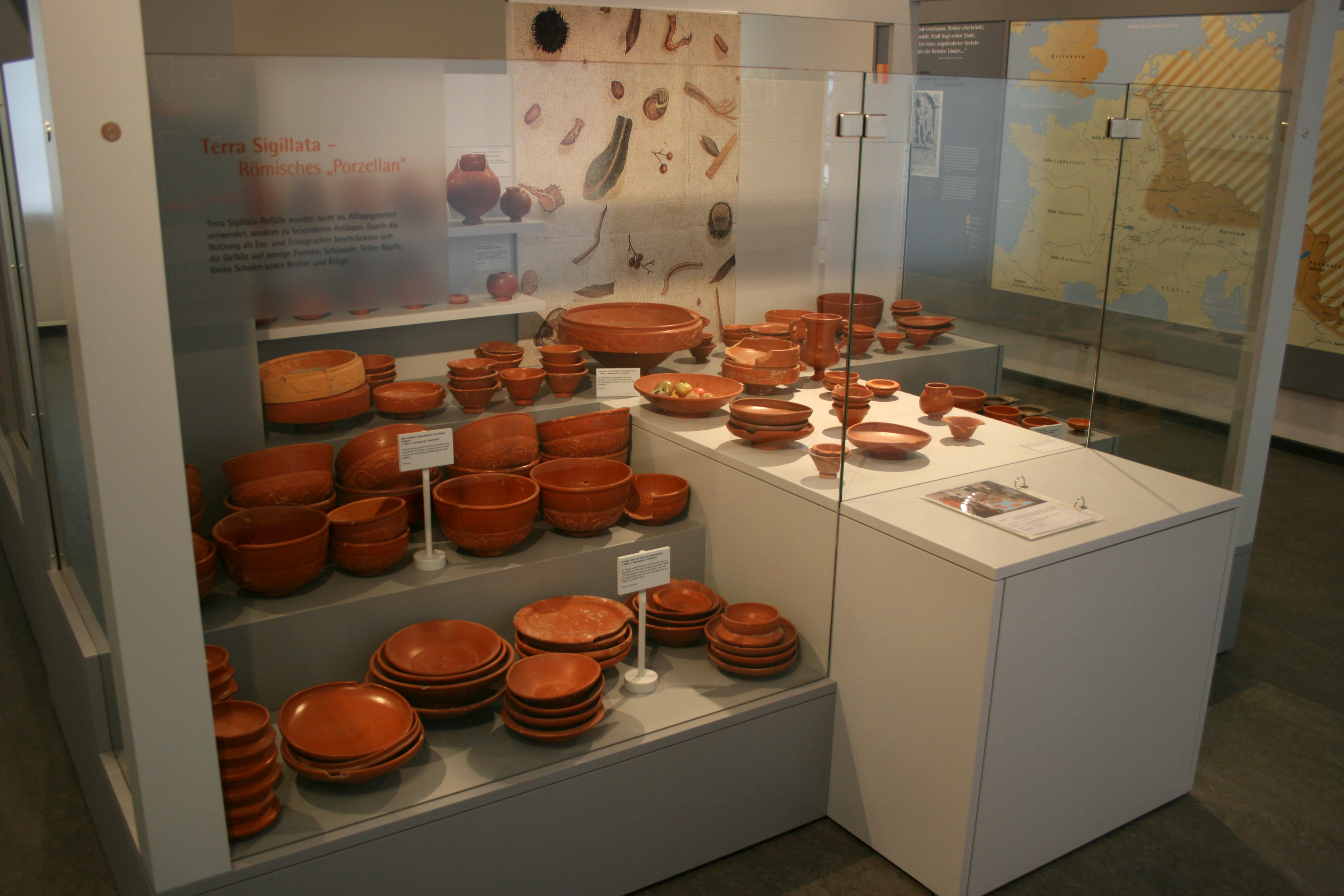 Vitrine mit Übersicht der häufigsten Formen der Rheinzaberner Terra Sigillata im dortigen Museum.